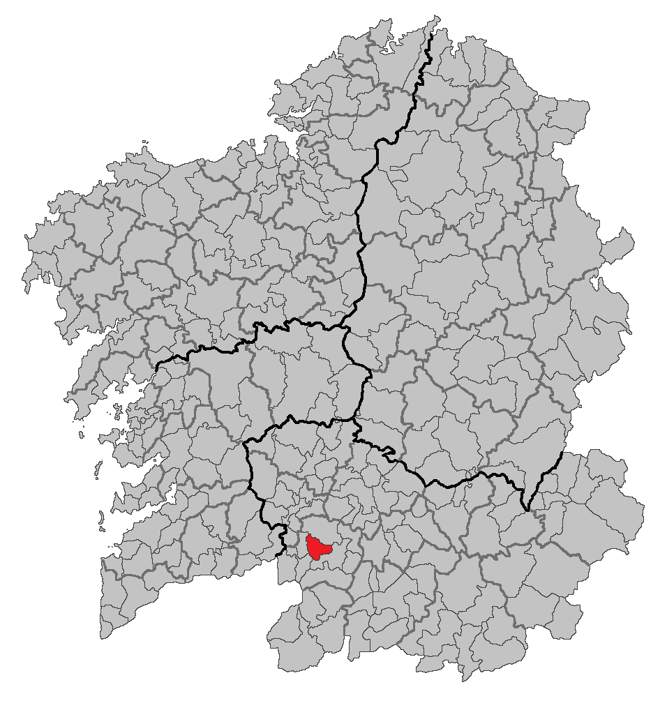 Mapa coa localización do concello de Ramirás.